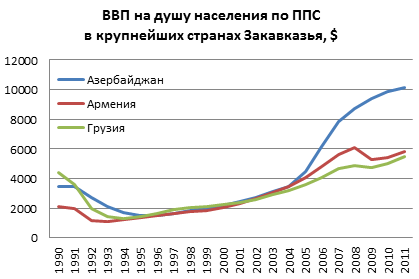 Динамика валового внутреннего продукта на душу населения по ППС в крупнейших странах Закавказья (Азербайджане, Армении и Грузии) в 1990-2011 годах, в долларах США. Источник данных